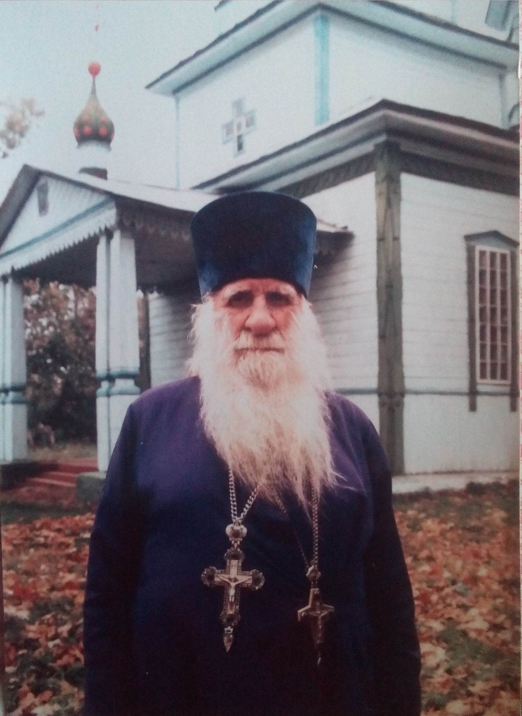 Отец Иоанн (1909—2005), священник села Ульяновка (ныне Вознесенское)